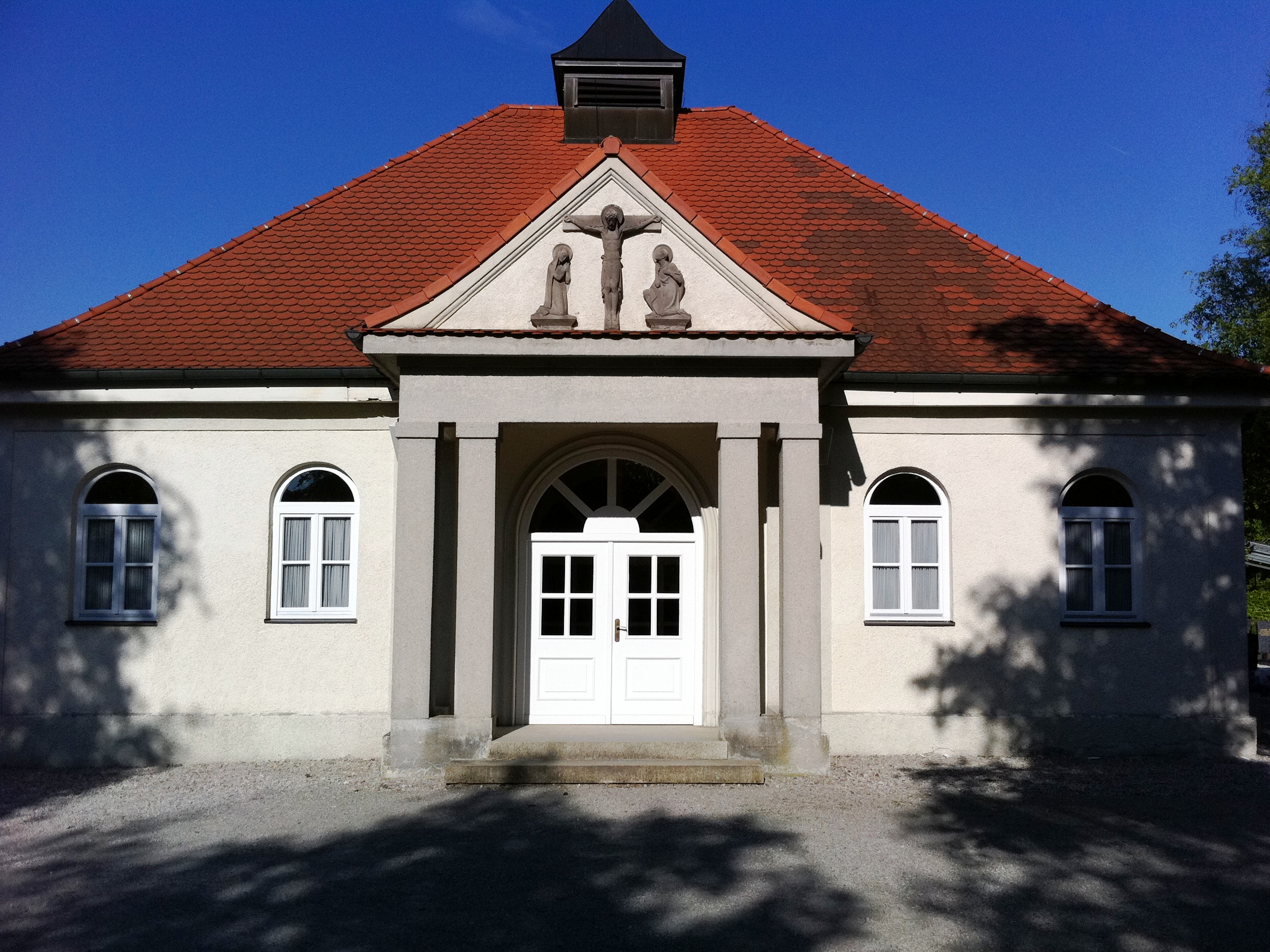 Denkmalgeschützte Leichenhalle im Friedhof (zwischen Aschheimer Straße und Straße An der Torfbahn gelegen) in Ismaning, Landkreis München.